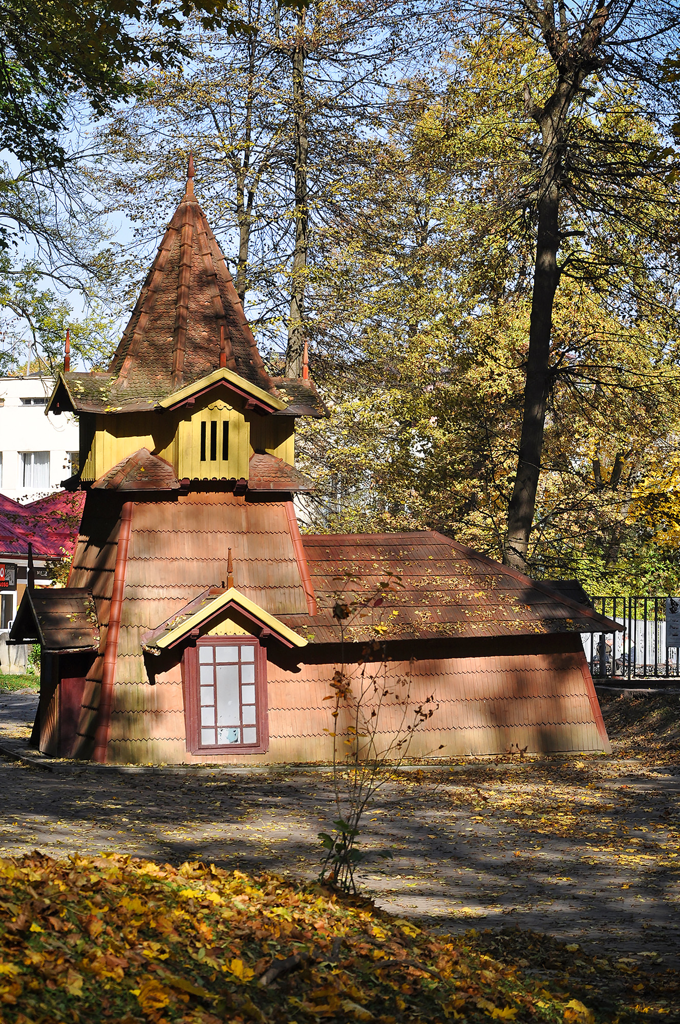 Памятка архитектуры - первый источник с лечебными водами на курорте